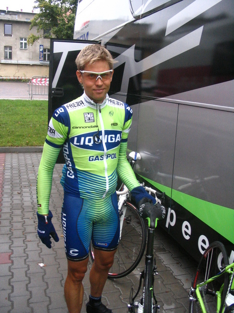 Czwarty etap 64. Tour de Pologne: Chojnice - Poznań